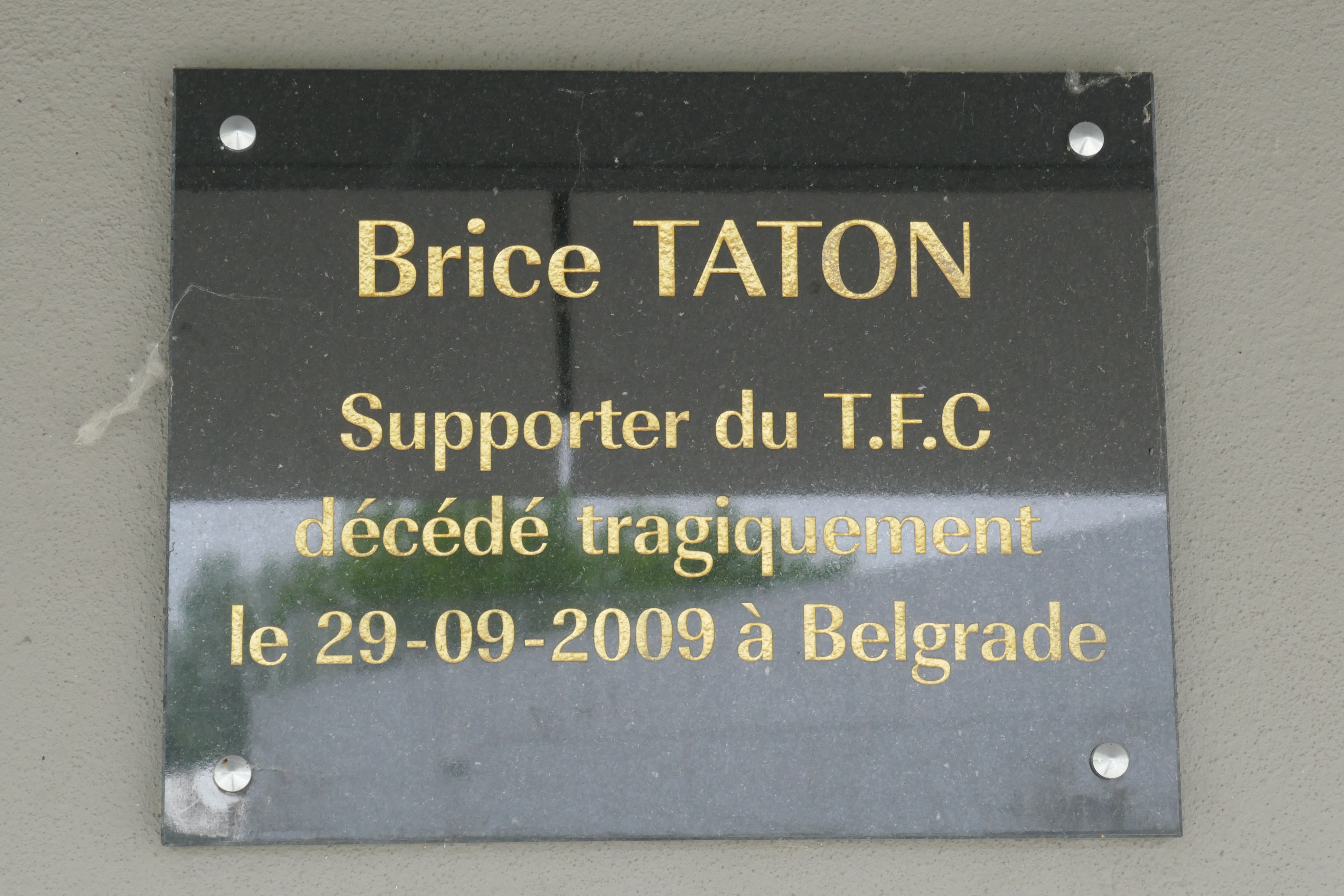 Plaque commémorative du virage Est "Brice Taton" du Stadium de Toulouse, inaugurée le 5 novembre 2009 en hommage à Brice Taton, décédé le 29 septembre 2009 à Belgrade.